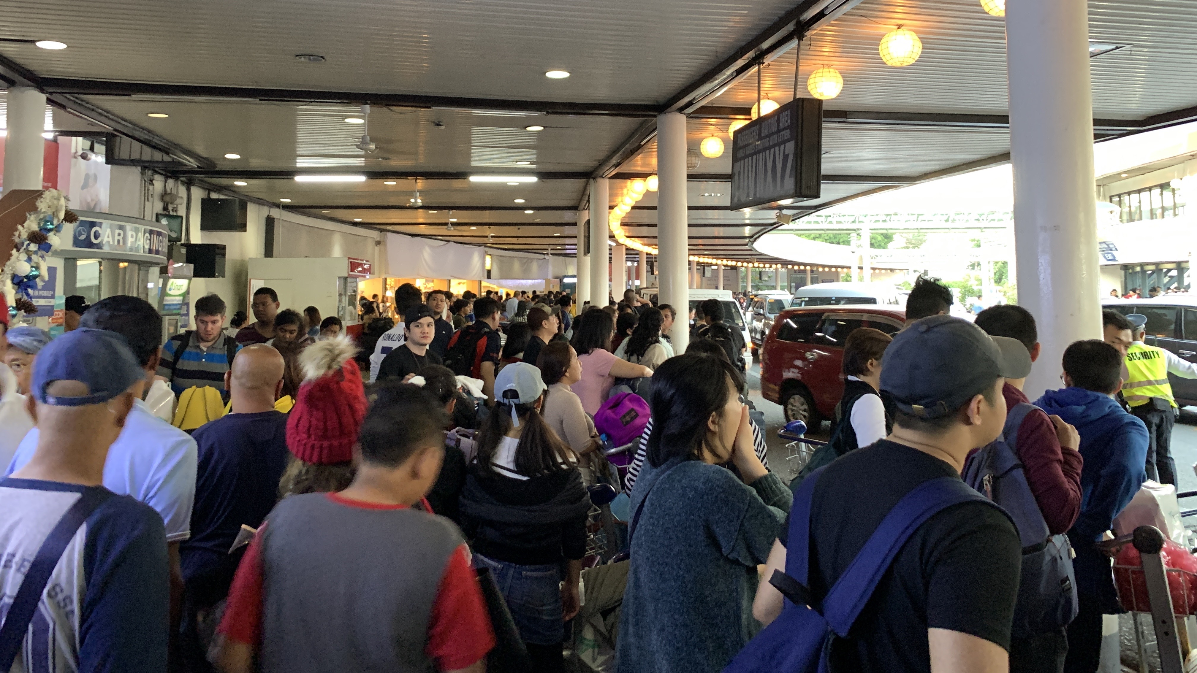 NAIA Arrivals